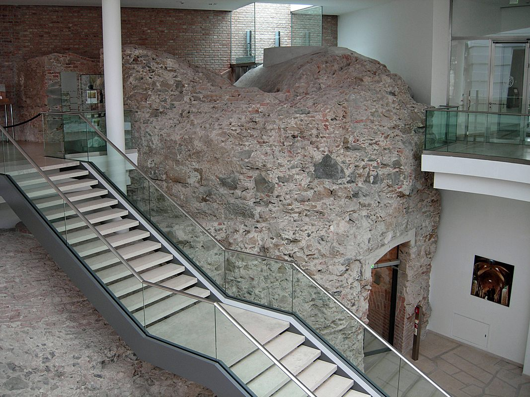 Wien - Reste der Coburgbastei im Inneren des Palais Coburg.